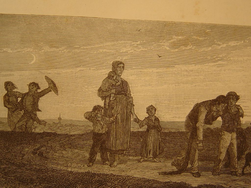 l'intempérance par yan'dargent